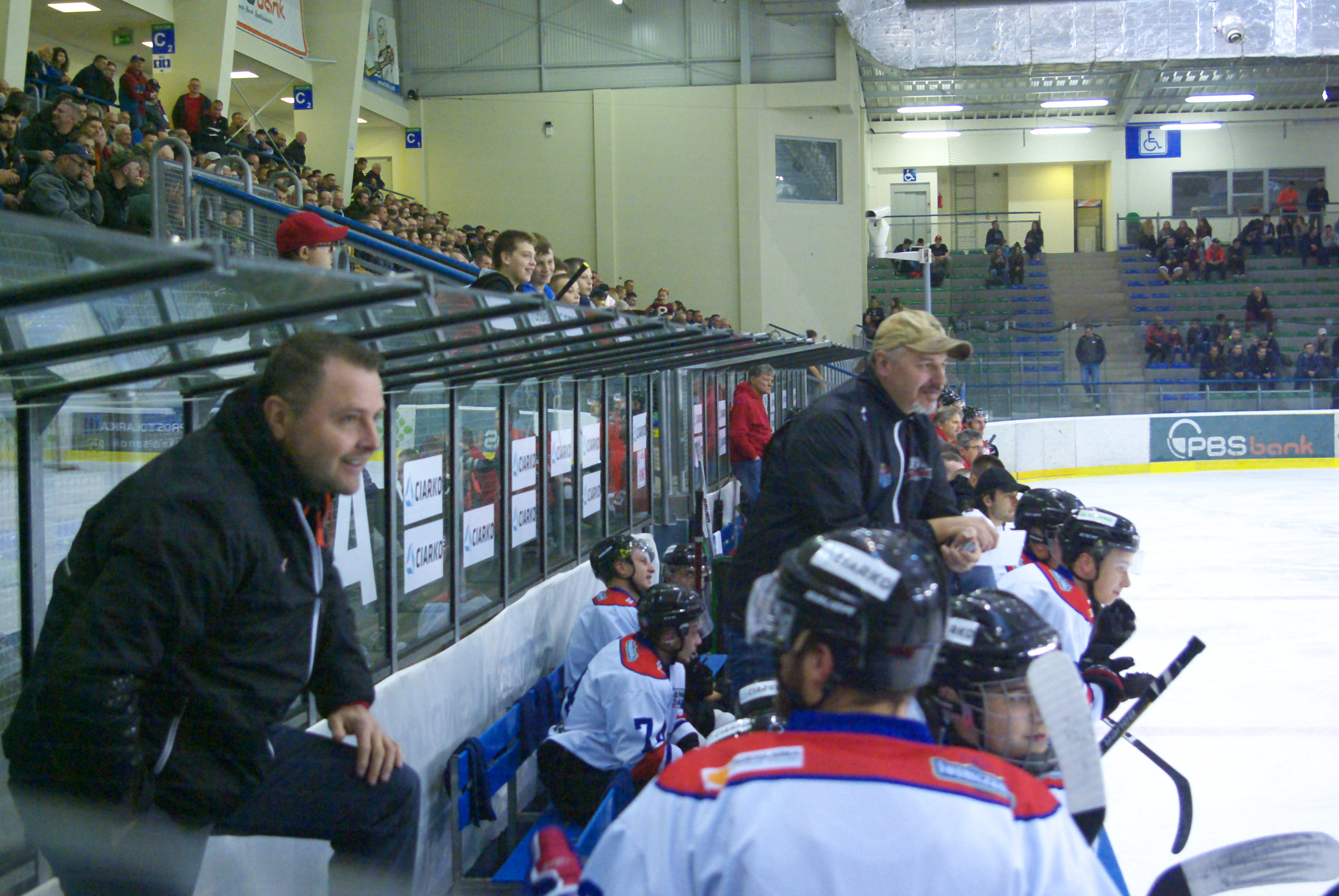 Mecz 2. ligi słowackiej w hokeju na lodzie Ciarko KH 58 Sanok - HKM Rimavská Sobota 4:2 (3 listopada 2018). Ławka sanockiego klubu. Od lewej trenerzy: Tomasz Demkowicz i Marcin Ćwikła.